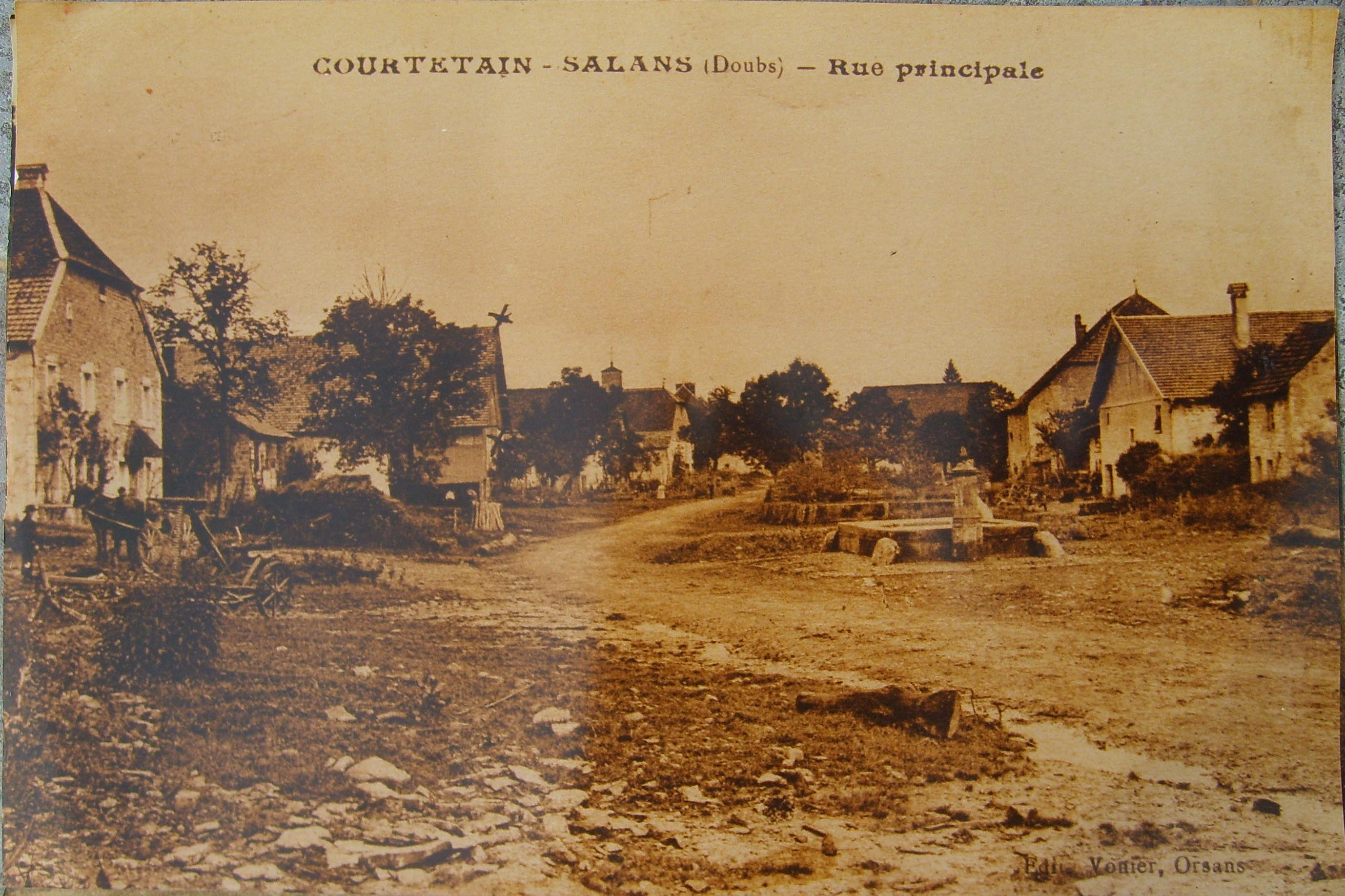 Rue principâle de Courtetain-et-Salans au début du XXe siècle.